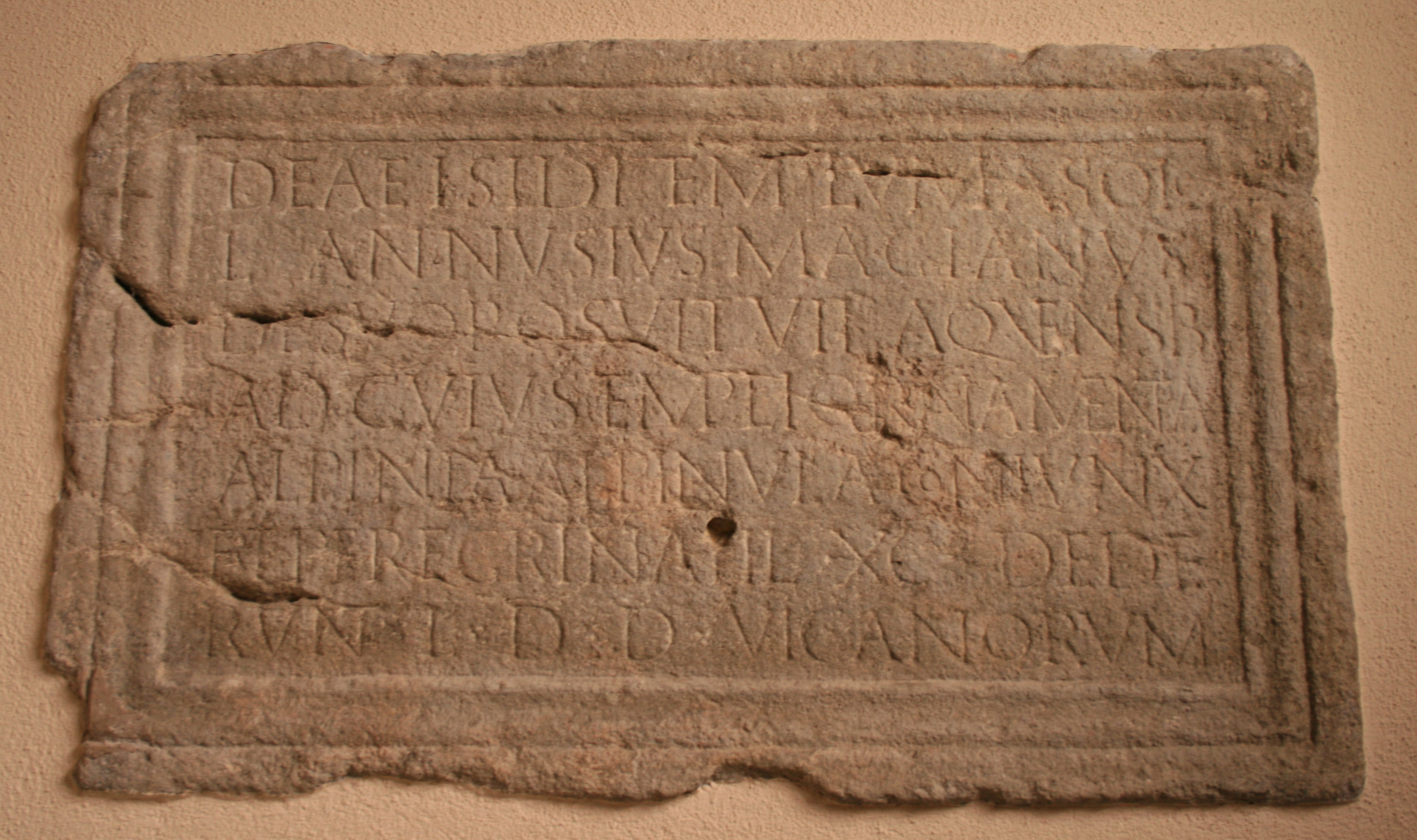 röm. Inschrift in der St. Sebastian-Kirche in Wettingen, Schweiz